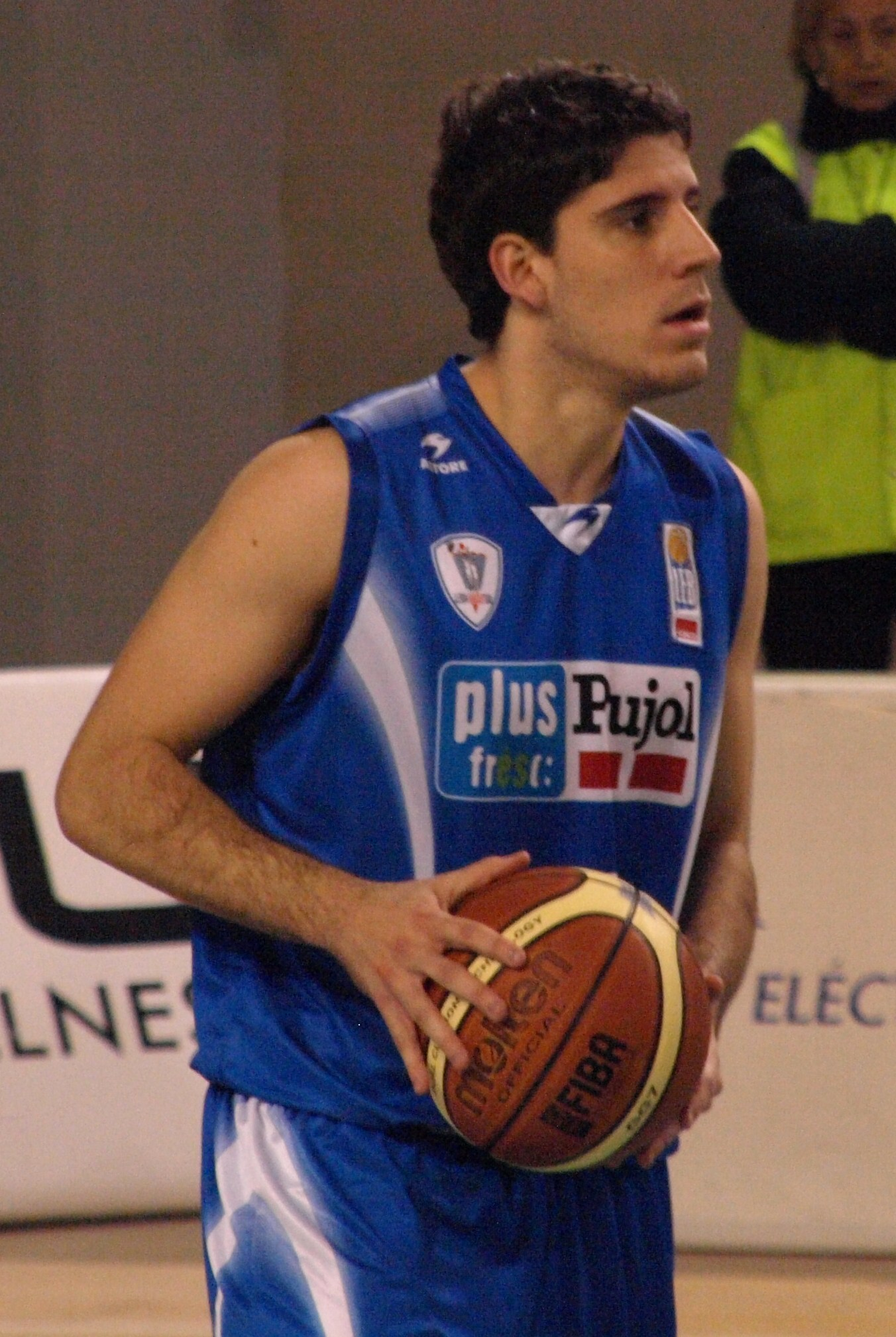 Quino Colom, con la camiseta del Plus Pujol Lleida en el partido que su equipo disputó ante el Cáceres 2016 Basket en enero de 2009 en el pabellón Mutiusos "Ciudad de Cáceres" de la liga LEB Oro 2008/09